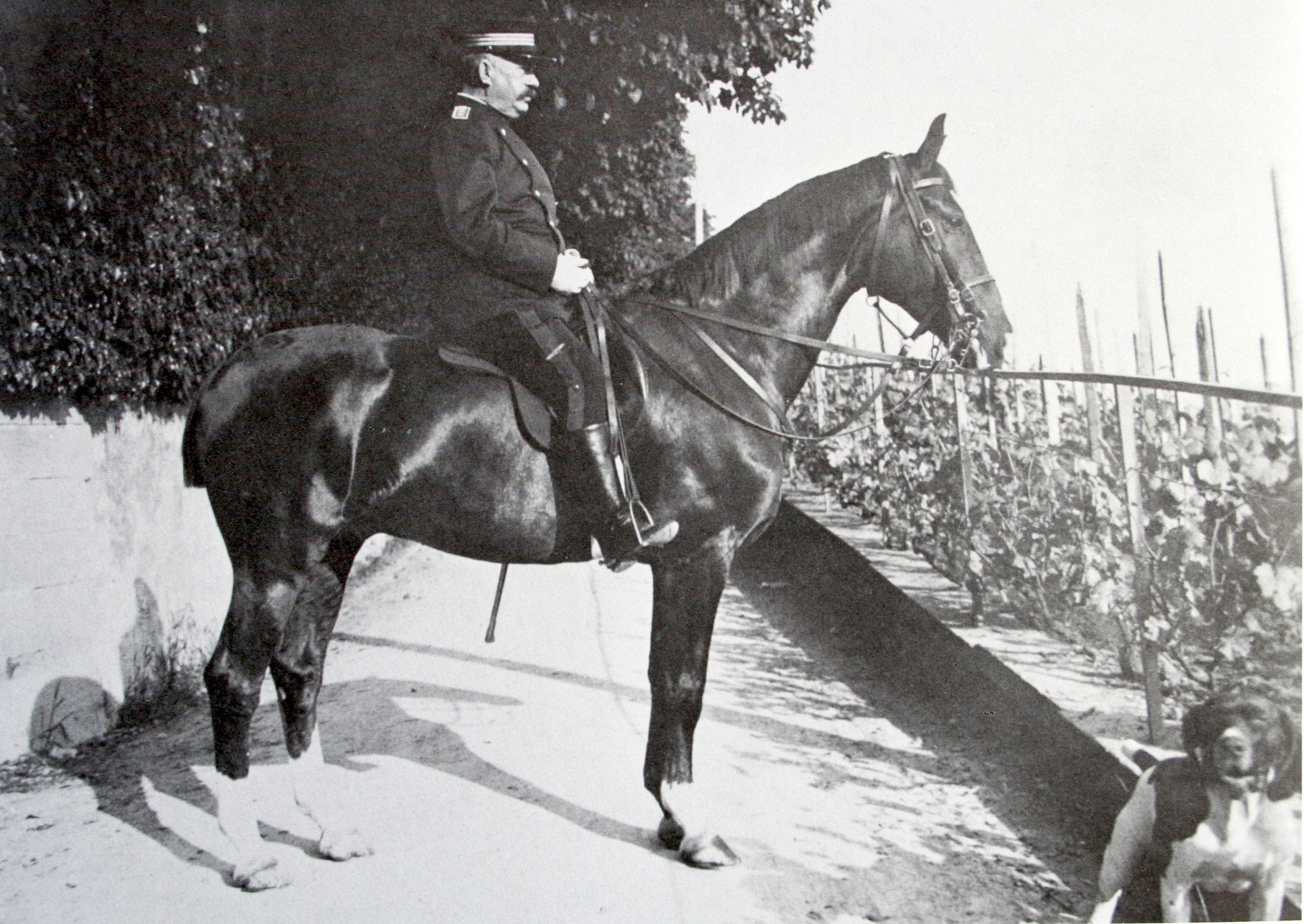 Korpskommandant Ulrich Wille um 1909 auf der Alten Landstrasse vor seinem Gut Marienfeld in Meilen ZH